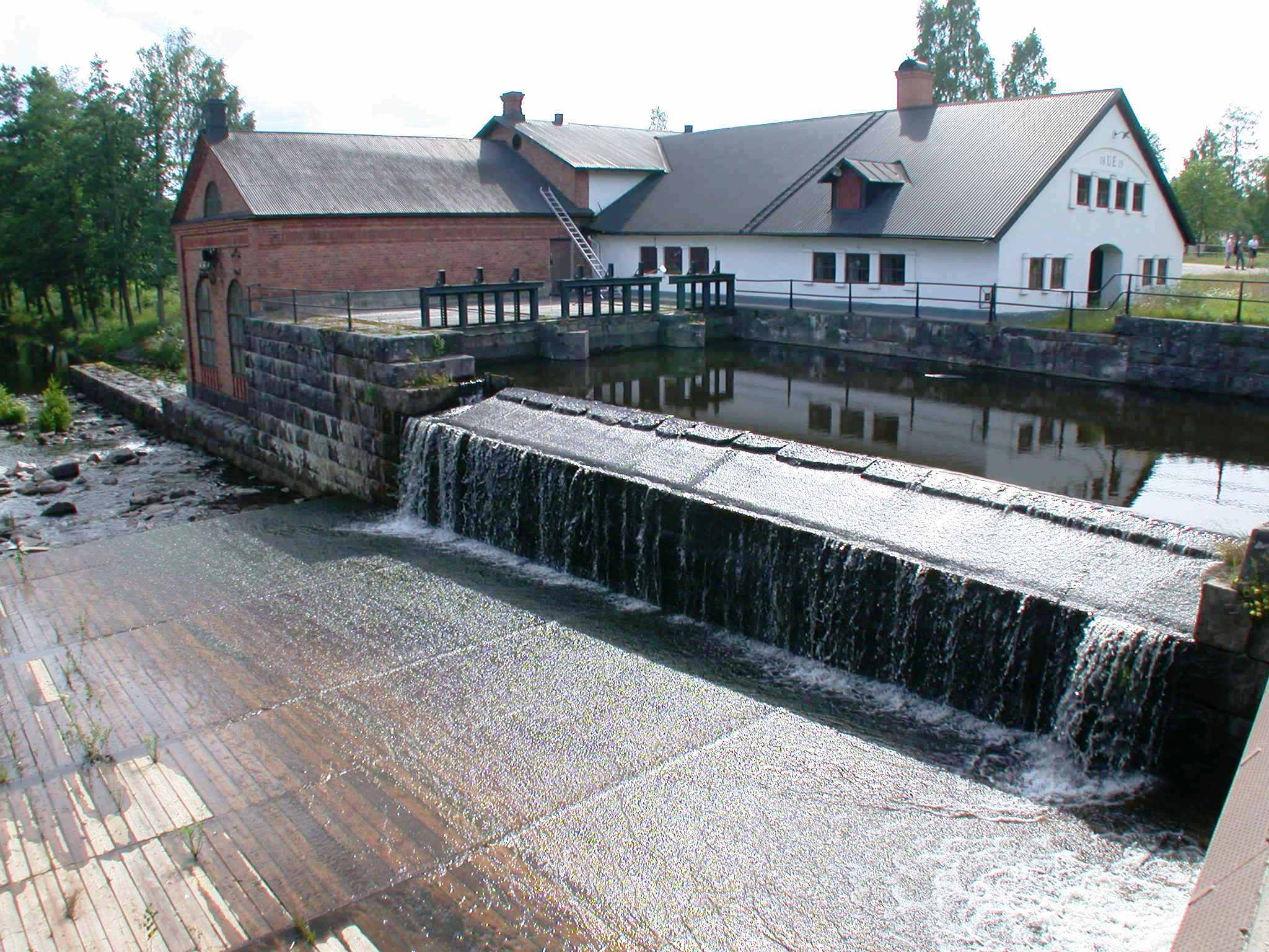 The dam at Mackmyra bruk and destillery